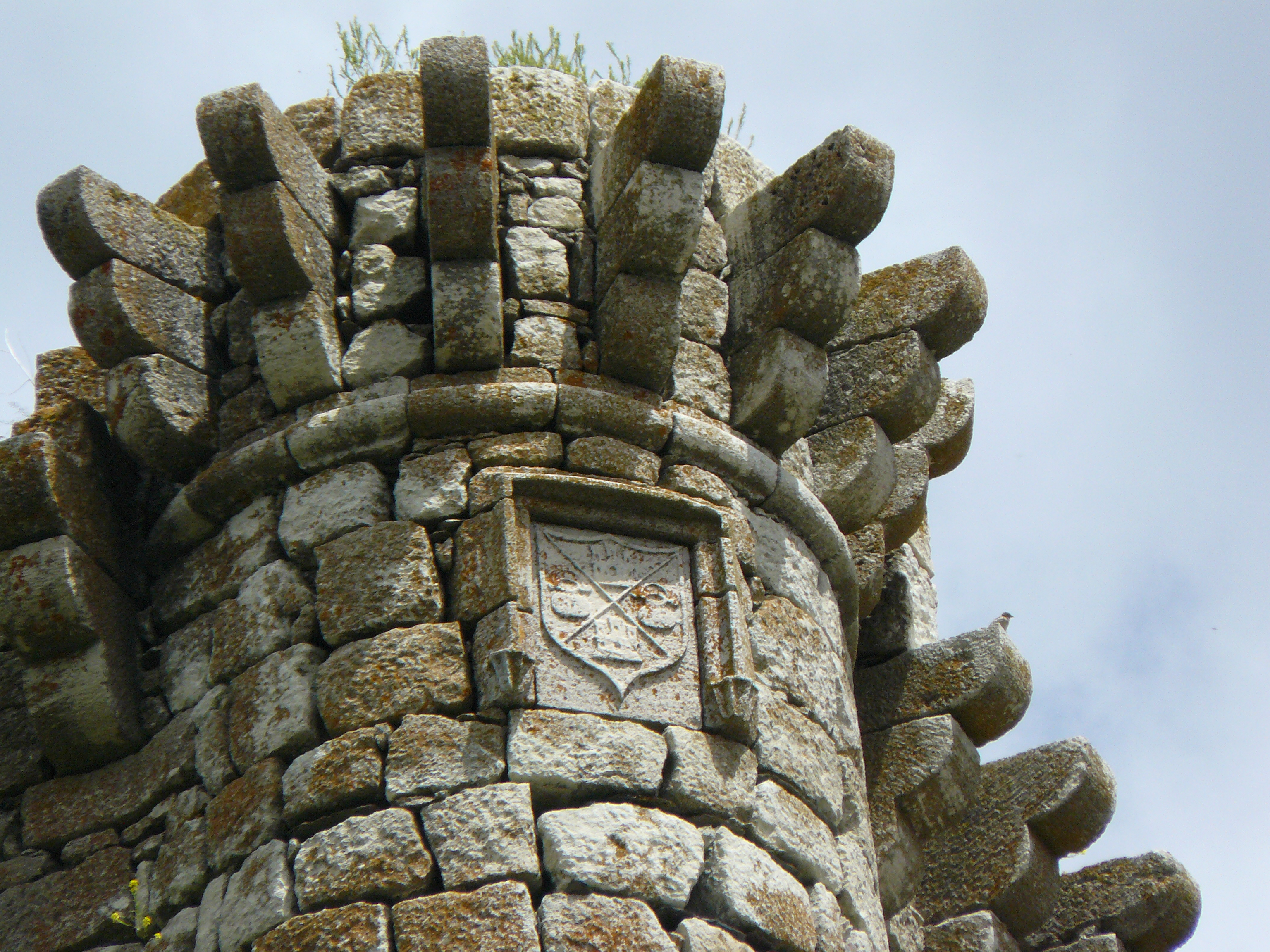 Castillo de Galve de Sorbe, Guadalajara.